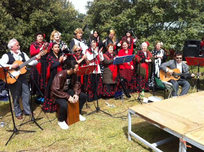 Grupo Rociero de Calalberche